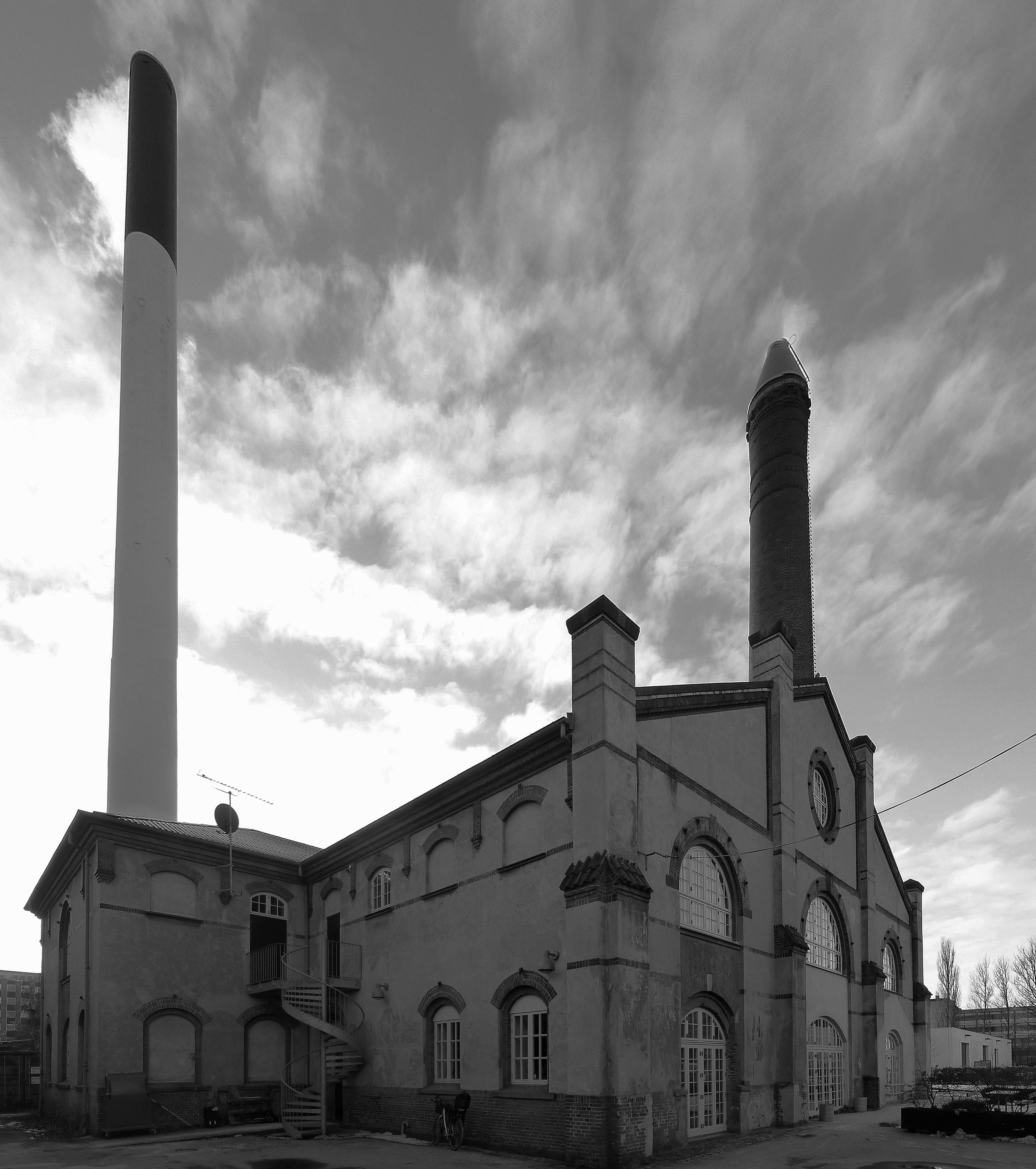 q= The former Frederiksberg Forbrændingsanstalt (Frederiksberg Inceneration Plant), now Keddelhallerne in Frederiksberg, Copenhagen, Denmark